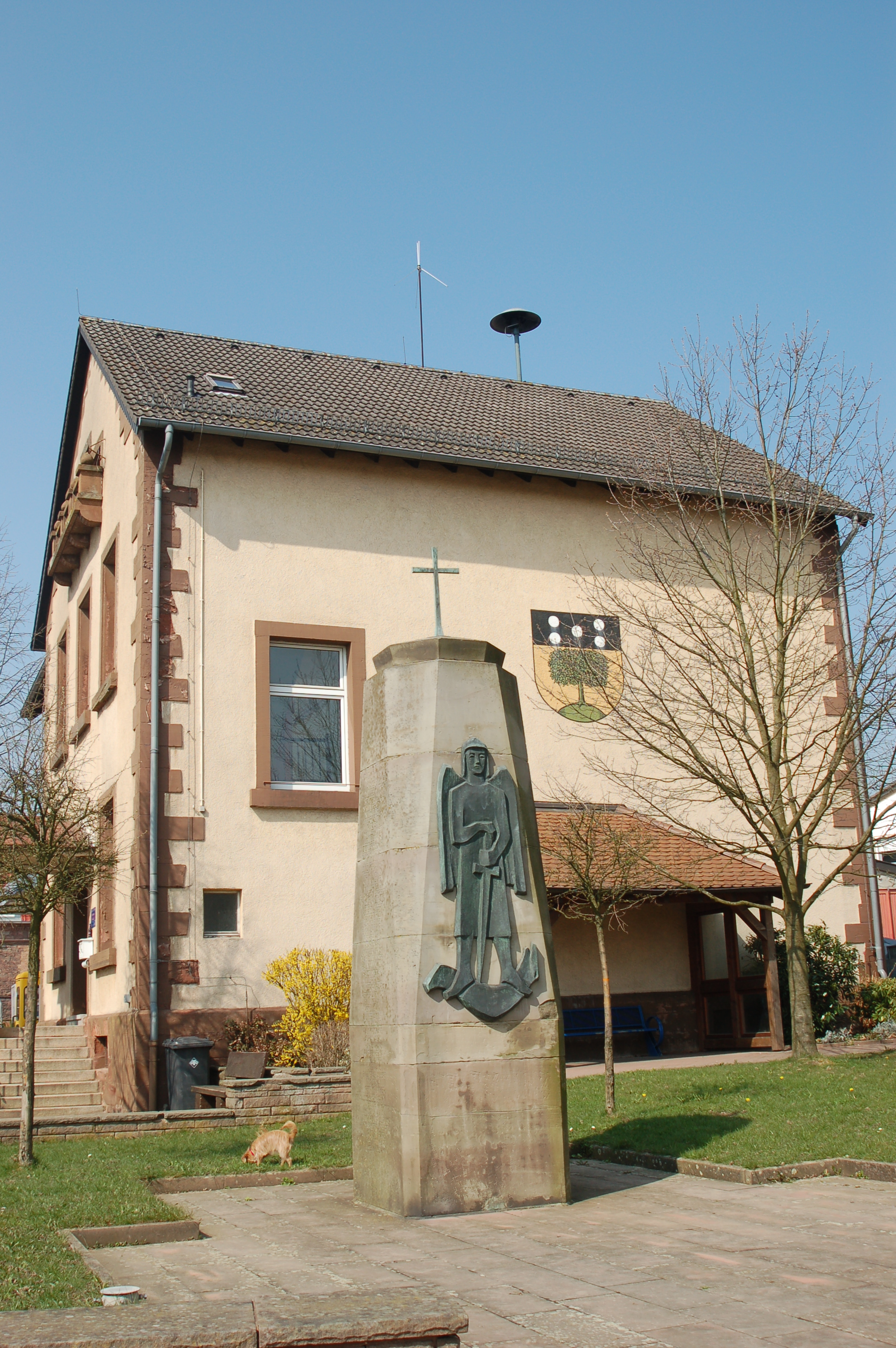 Selbst erstelltes Bild (Ortszentrum Hermersberg, Bürgermeisteramt) Author: Cvf-ps Datum: 01.04.2007